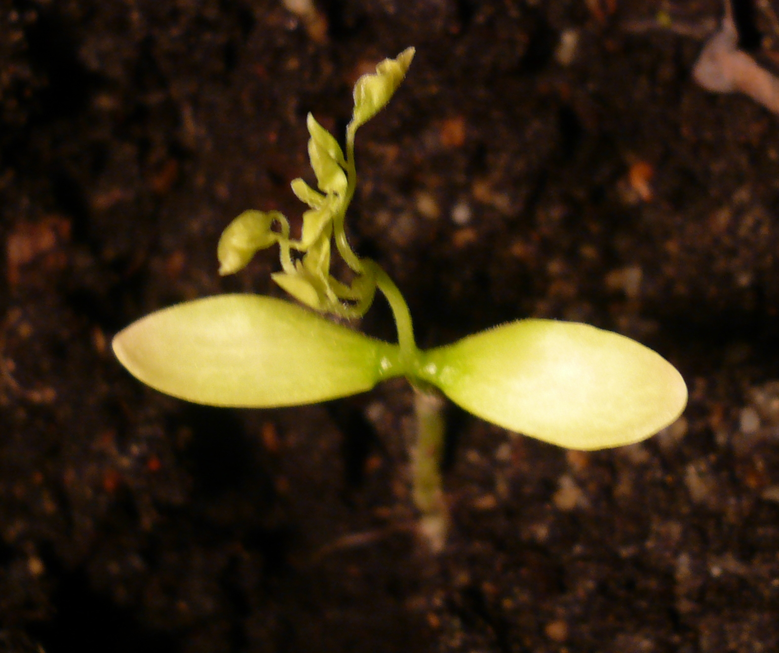 Siewka oskomianu pospolitego zaraz po zrzuceniu okryw nasiennych